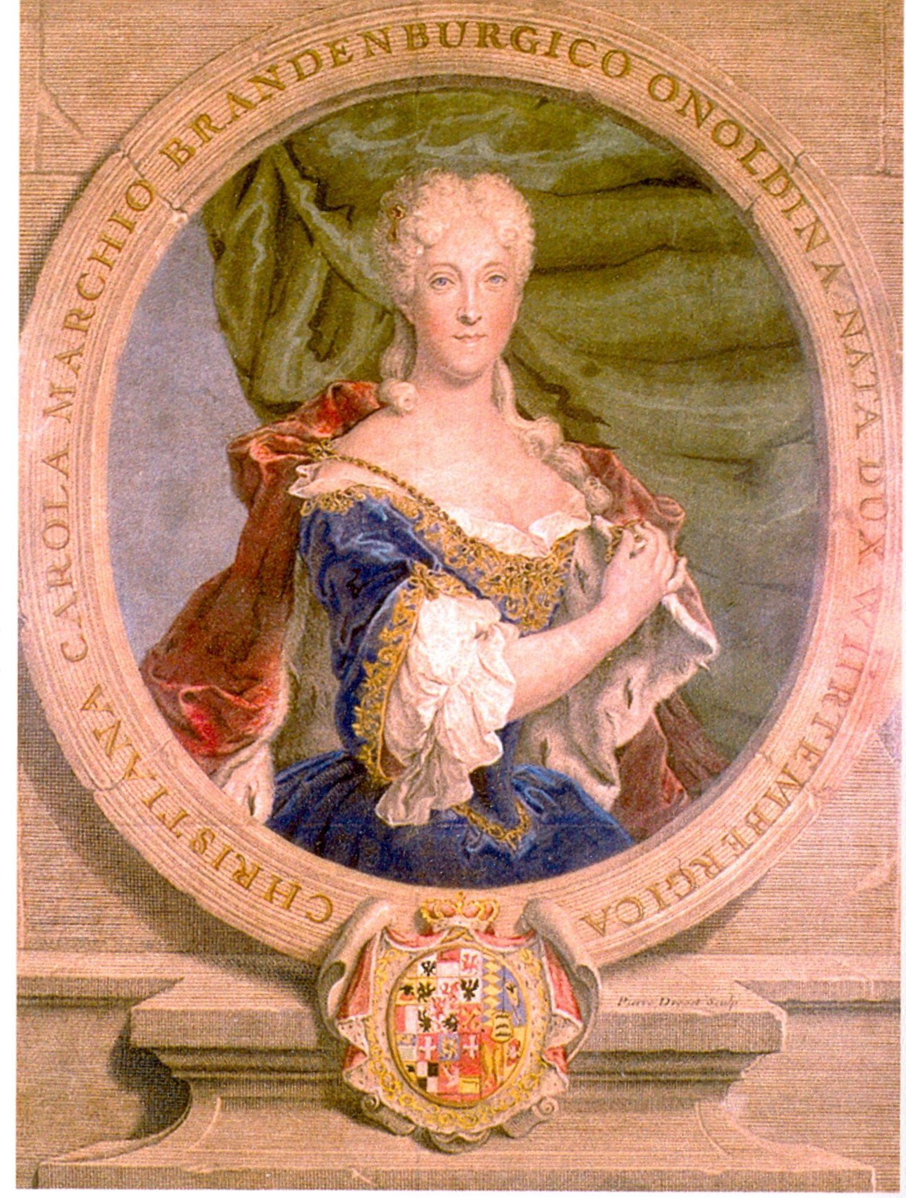 Herzogin Christiane Charlotte (1694 - 1729), Tochter von Herzog Friedrich Carl. Kolorierter Kupferstich